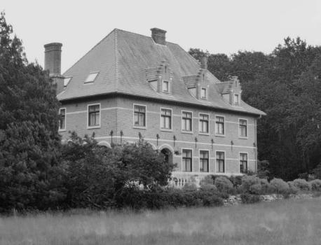 Château de la Clairière à la Libération